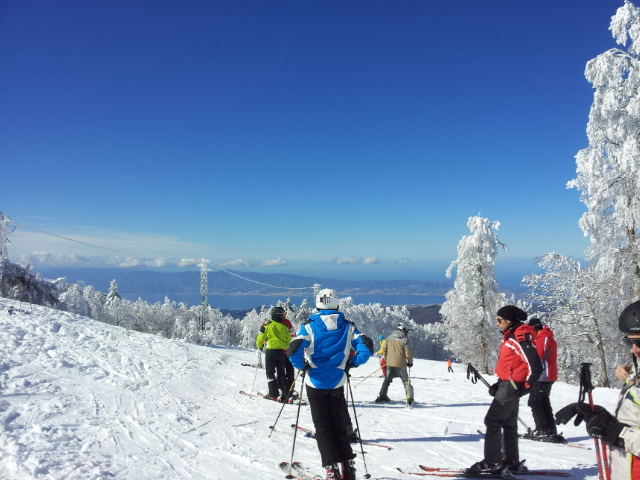 Sciare guardando il mare